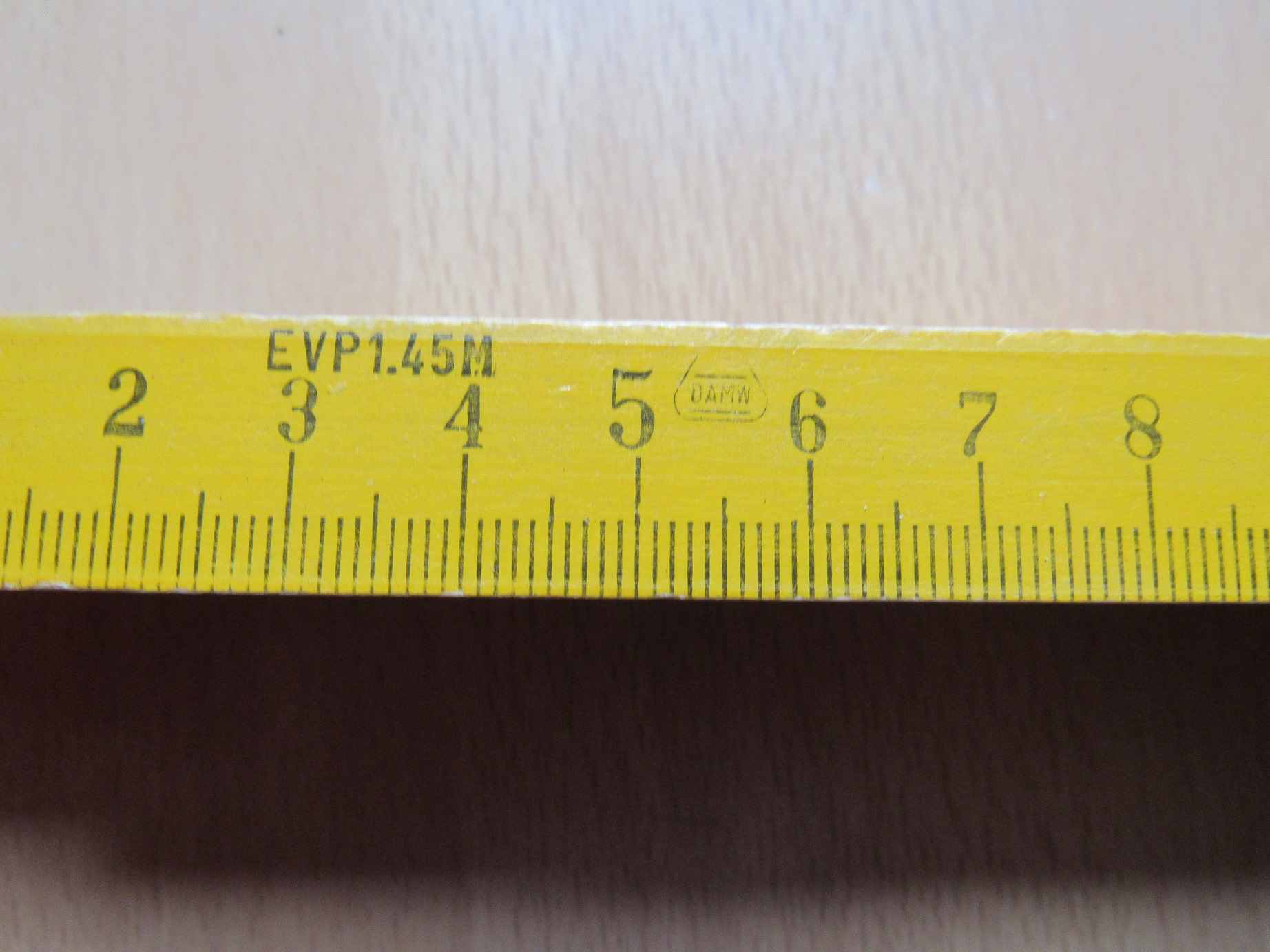 EVP-Preisangabe und DAMW-Logo auf DDR-Zollstock